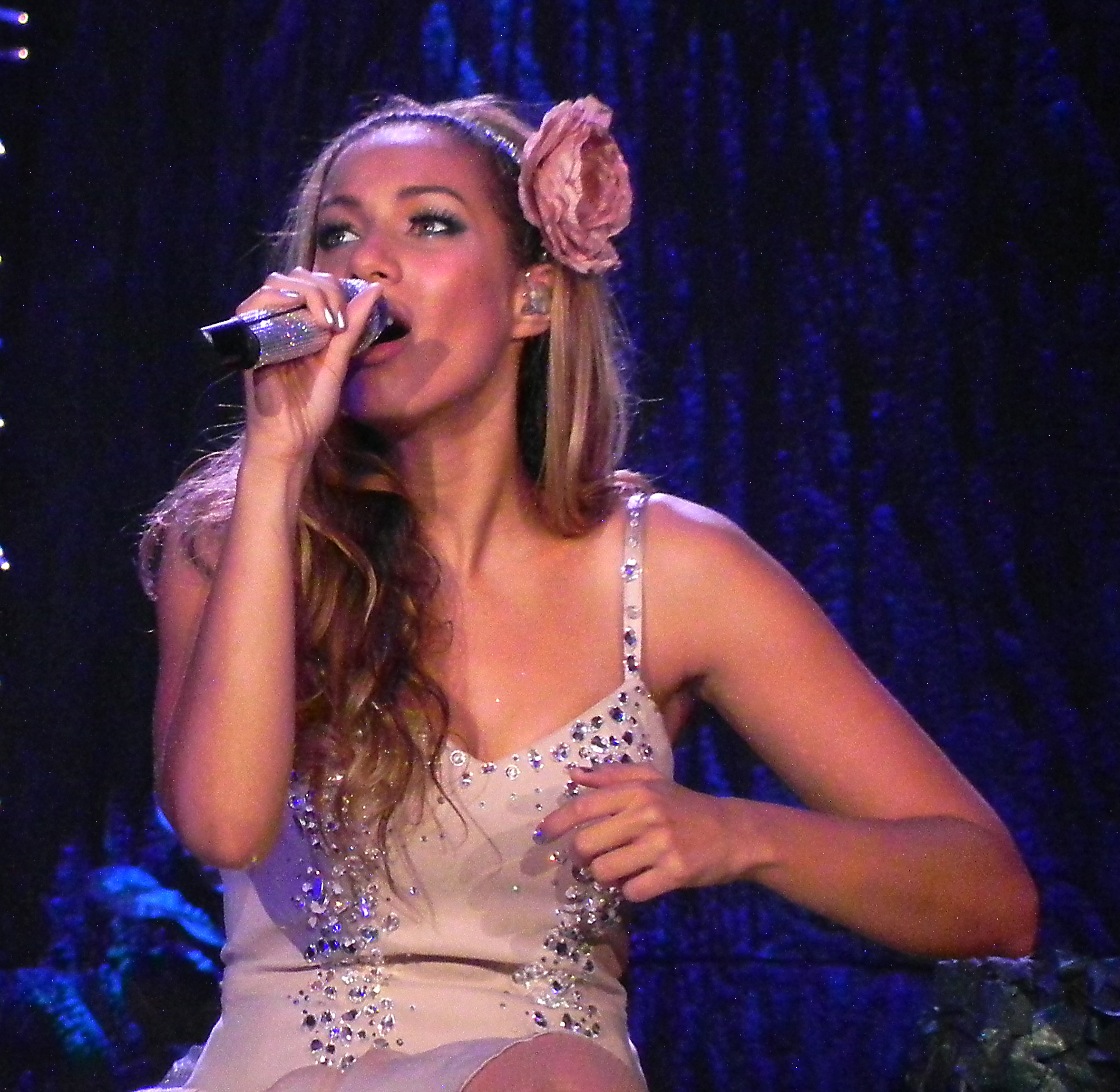 Leona 166-sRGB